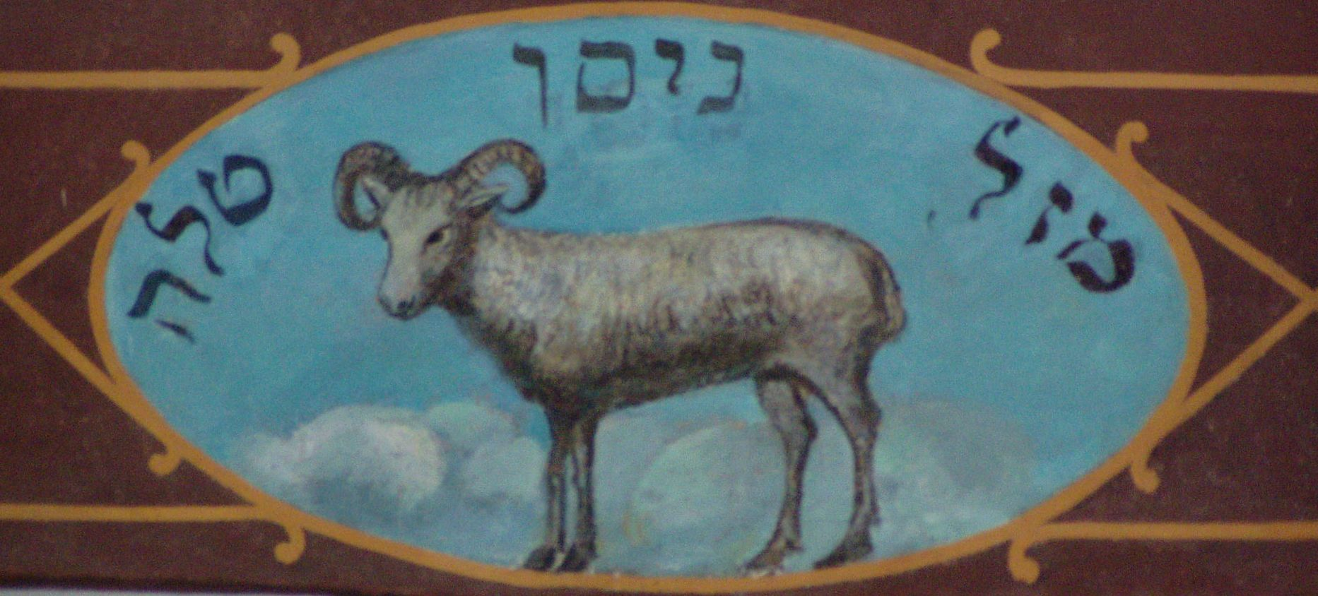 Znaki zodiaku na belkowaniu galerii dla kobiet synagogi Kupa w Krakowie